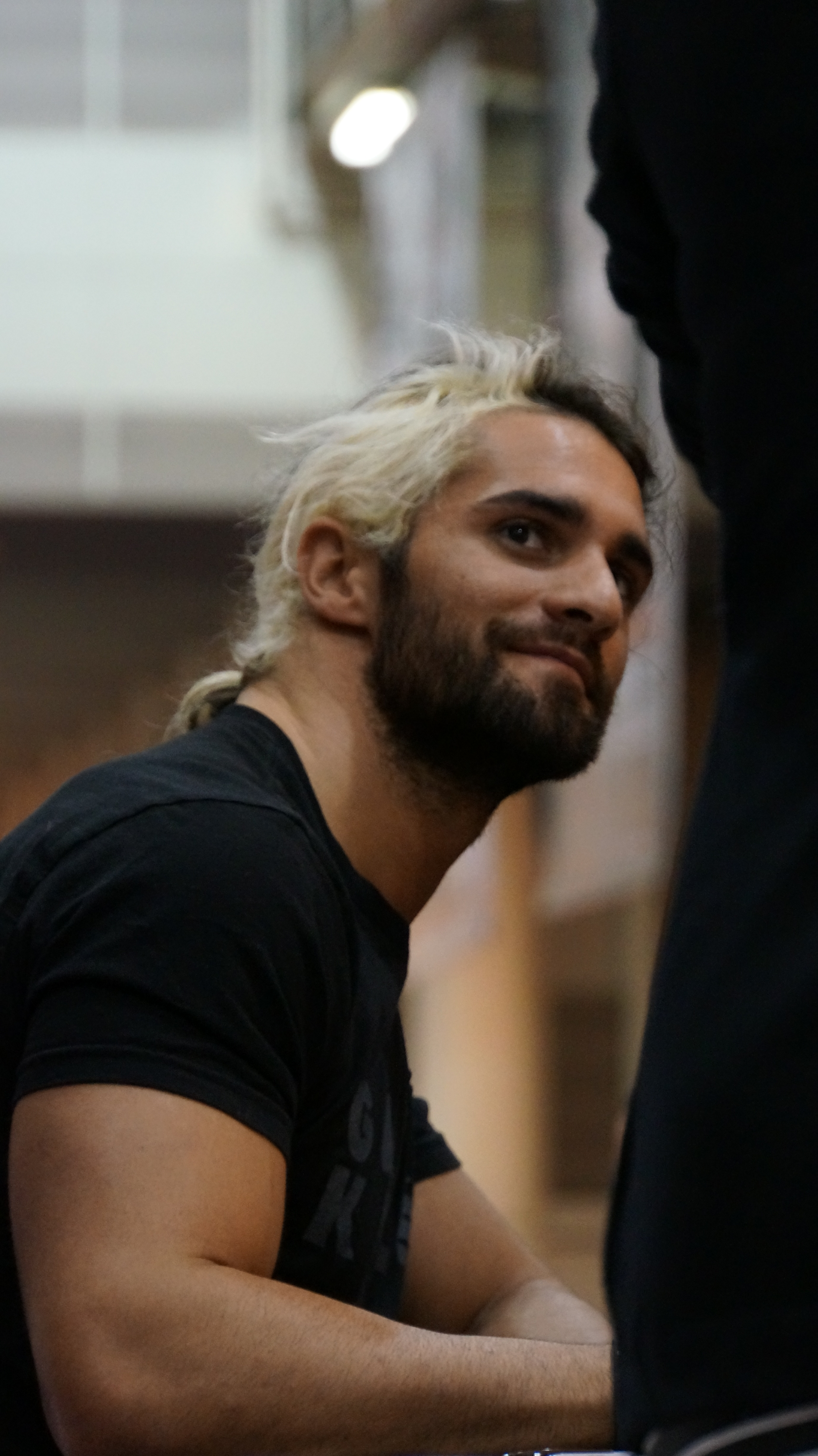 2014-04-05_14-22-43_NEX-6_DSC08252